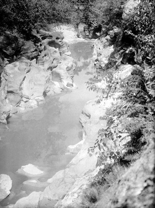 Negatief. Kali Kedungtjinet op houtvesterij Plosso, bij Djombang, O.Java